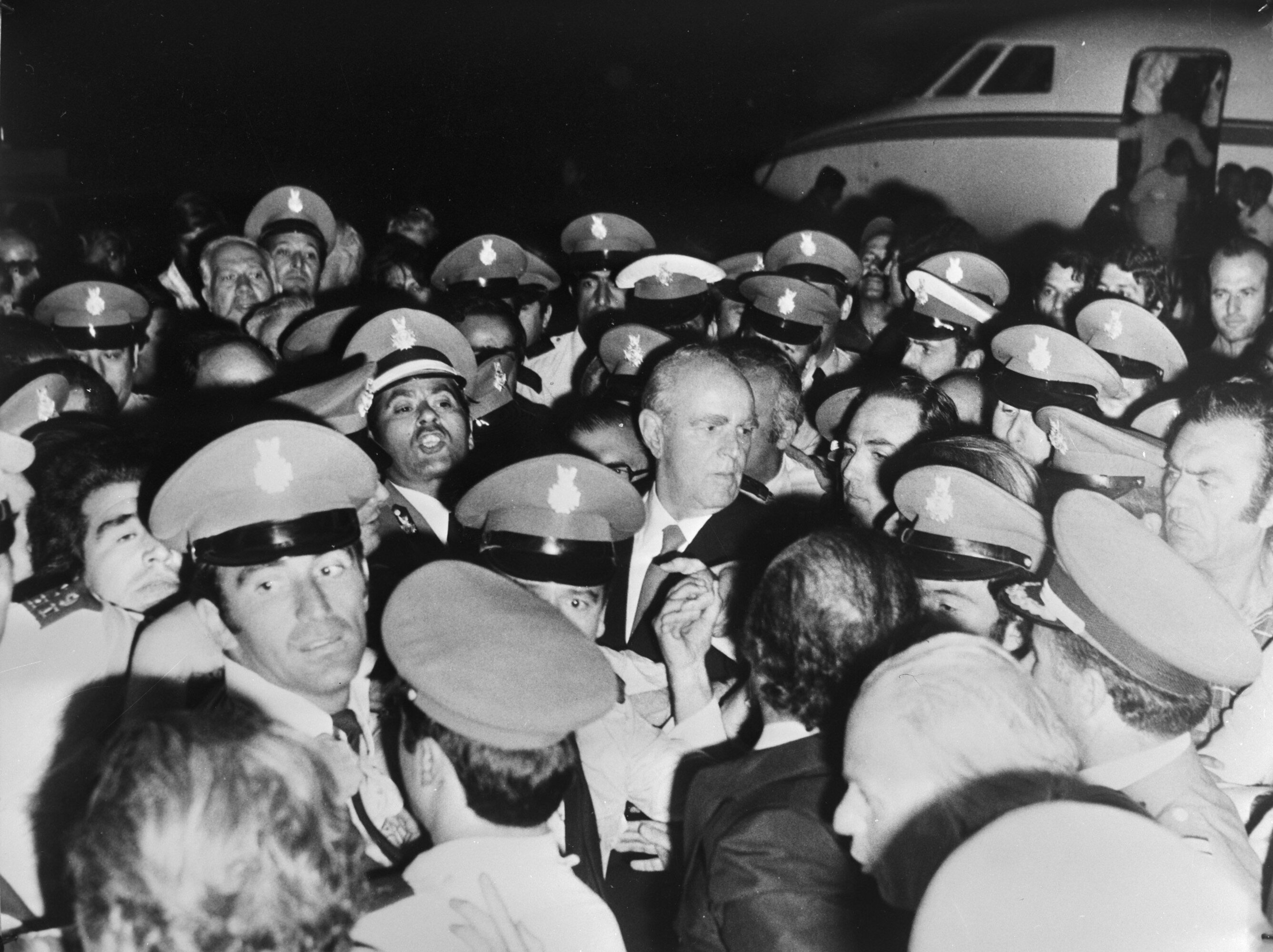 Collectie / Archief : Fotocollectie Anefo Reportage / Serie : [ onbekend ] Beschrijving : Constantin Karamanlis (nieuwe premier van Griekenland) uit Parijs in Athene; Karamanlis tussen politie en militairen Datum : 26 juli 1974 Locatie : Athene, Griekenland, Parijs Trefwoorden : MILITAIREN, POLITIE, premiers Persoonsnaam : KARAMANLIS Fotograaf : Fotograaf Onbekend / Anefo Auteursrechthebbende : Nationaal Archief Materiaalsoort : Negatief (zwart/wit) Nummer archiefinventaris : bekijk toegang 2.24.01.04 Bestanddeelnummer : 927-3512